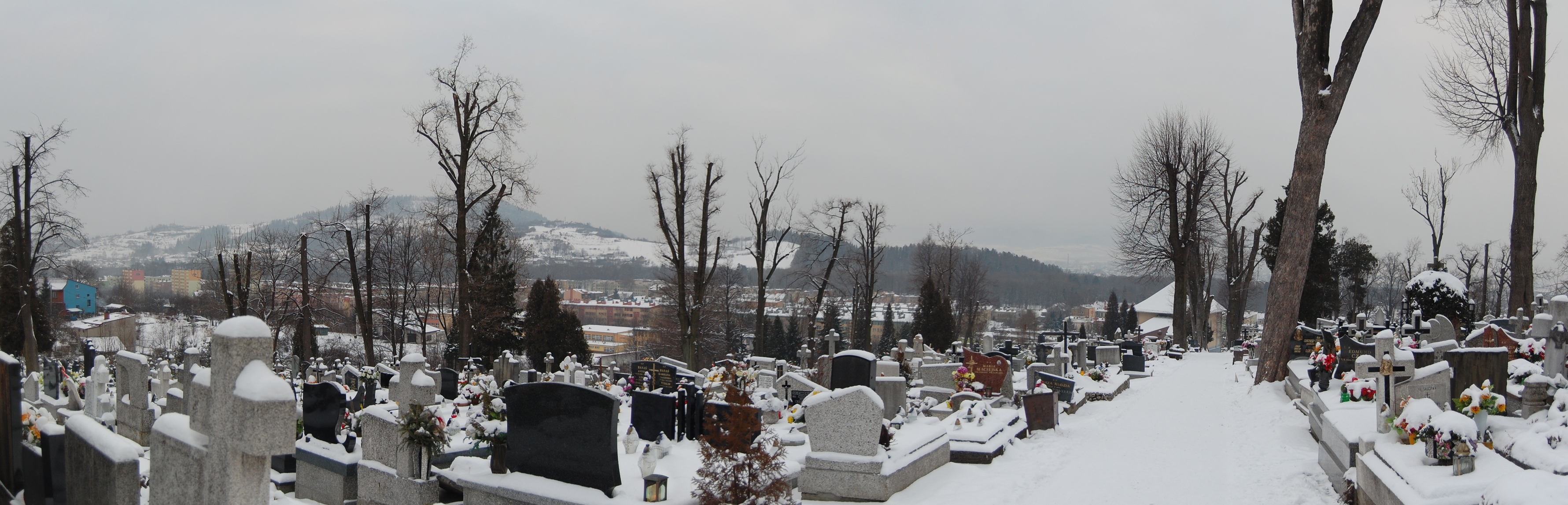 Hřbitov při ulici Komonieckiego v Żywci (Polsko)